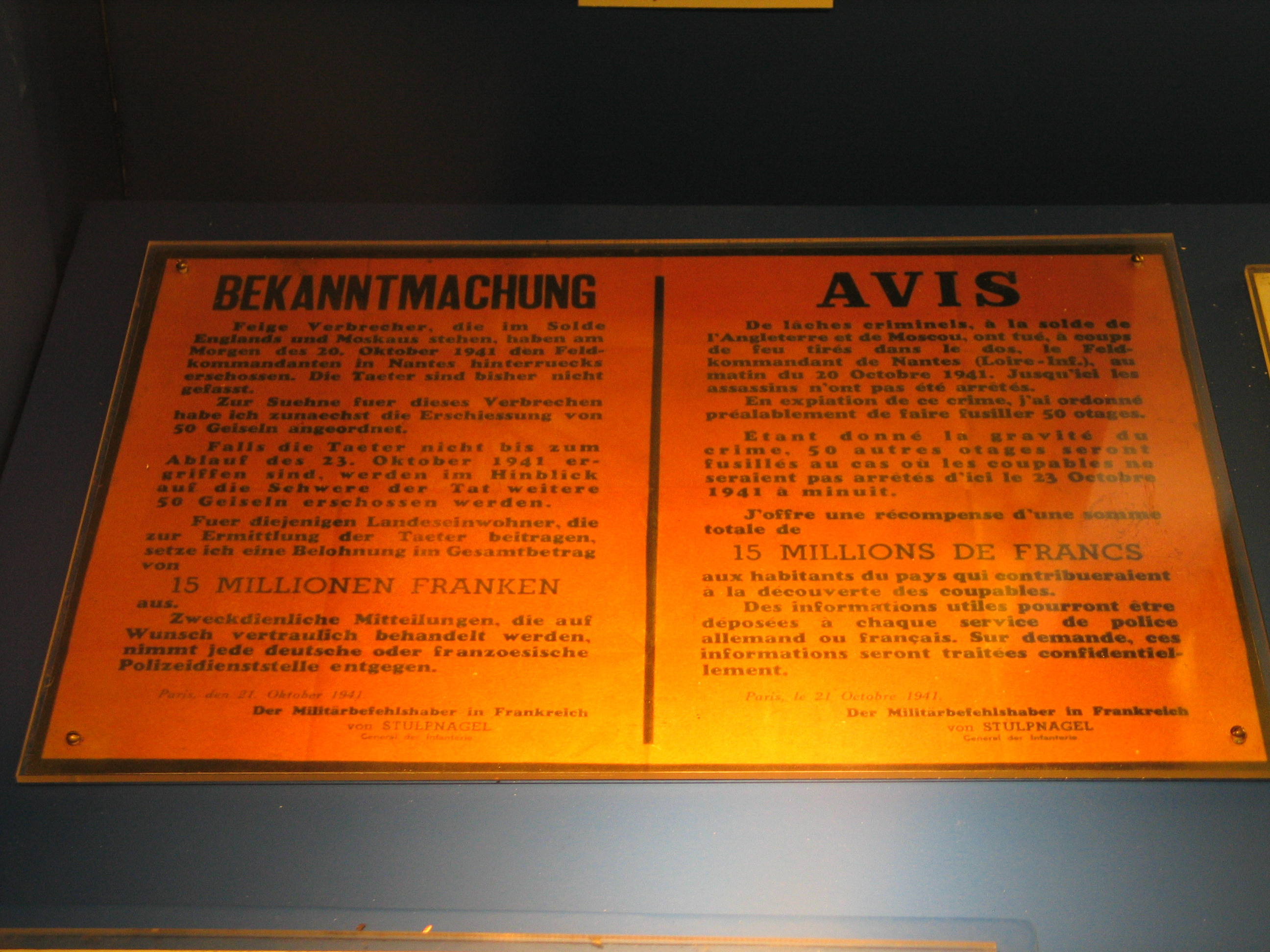 Exposition métro Guy Môquet, Paris